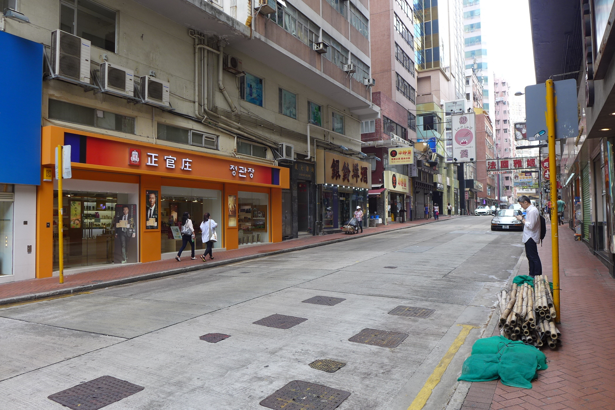 Hillwood Road